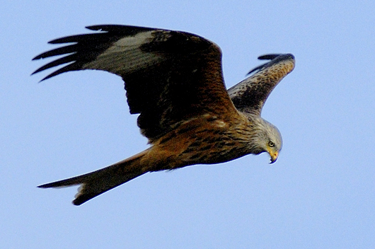 Segelnder Rotmilan auf Beutesuche